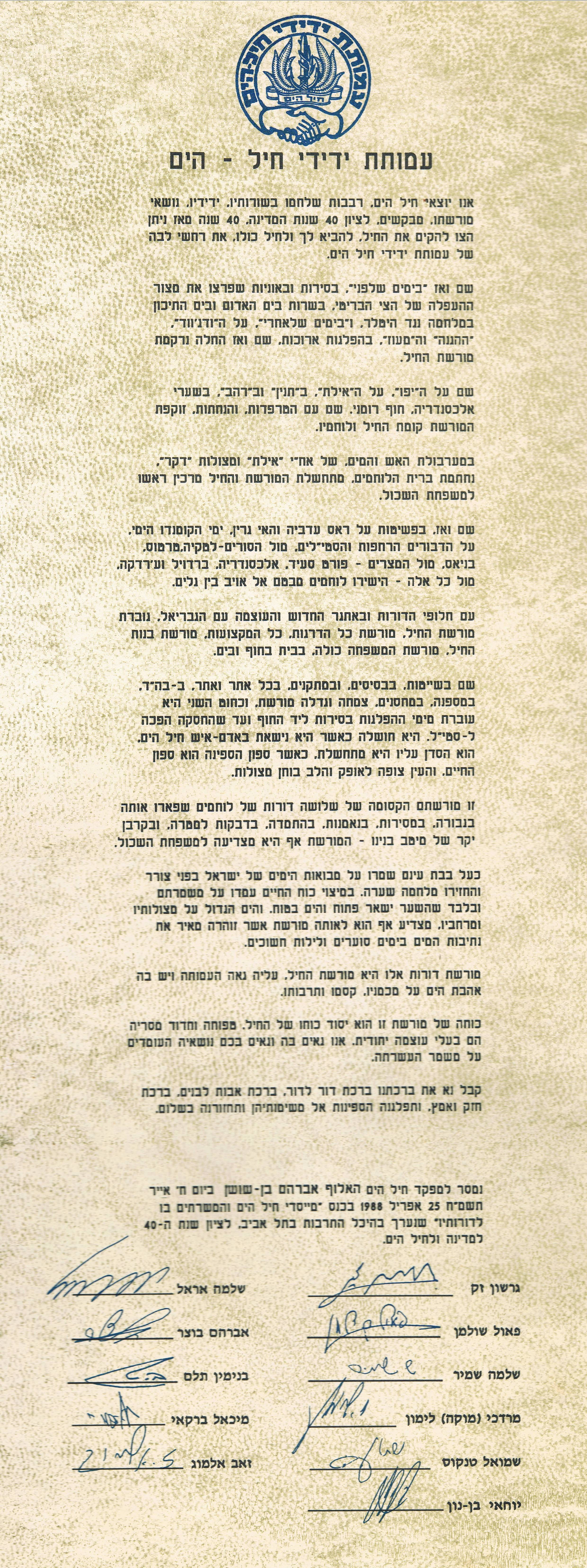 מגילת הקמת העמותה בחתימת מפקדי חיל הים